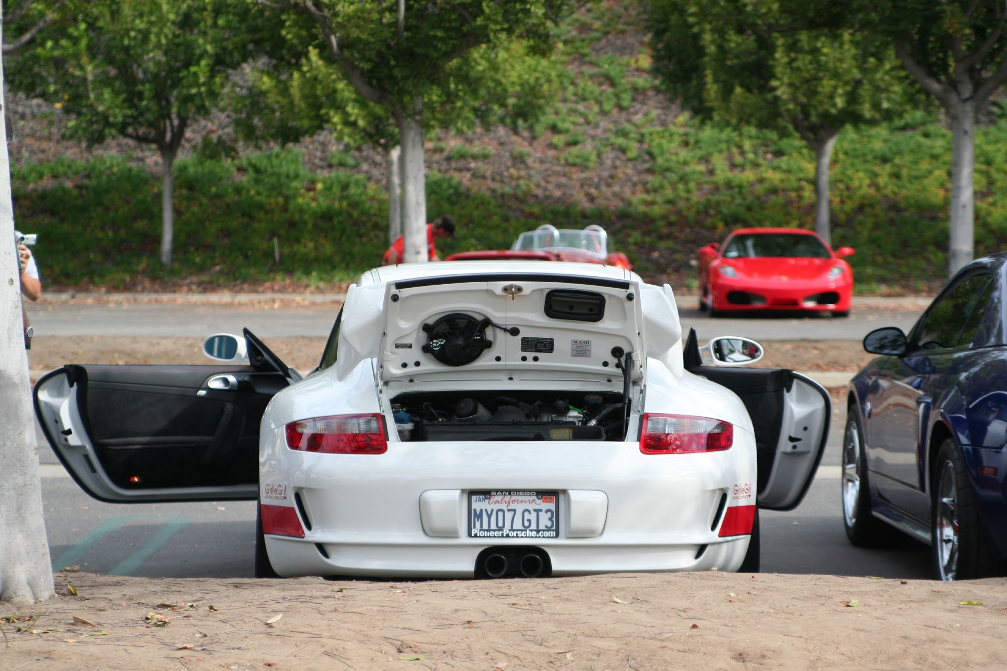 2007 Porsche 911 GT3 (997)